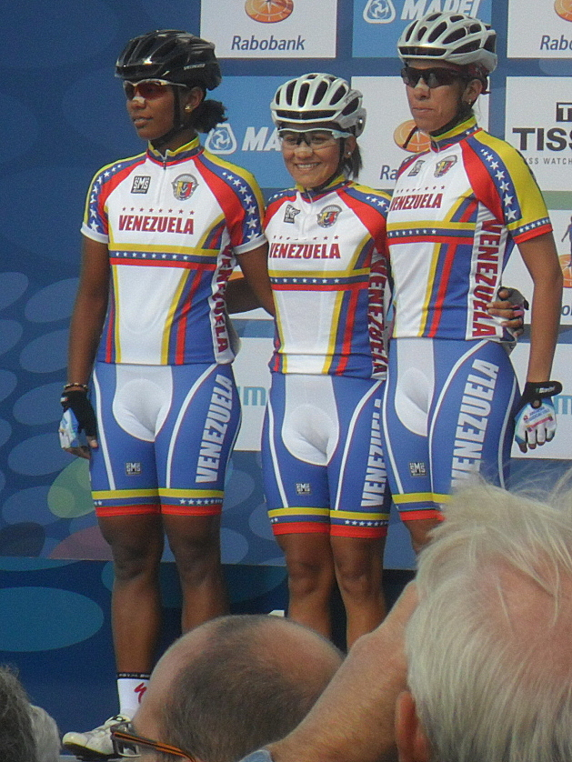 Ploegenpresentatie Venezuela voor de start van het Wereldkampioenschap 2012 in Valkenburg, Nederland.